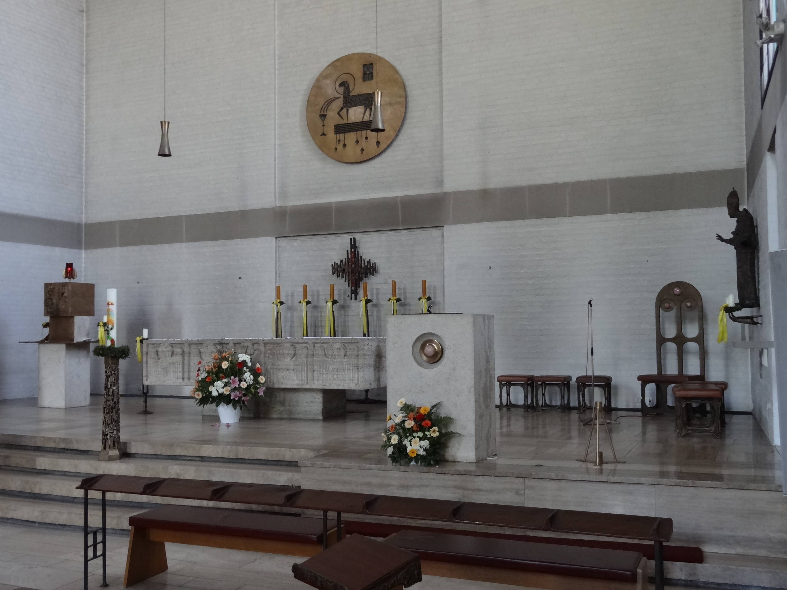 Altarraum der Pfarrkirche St. Pius in Landshut